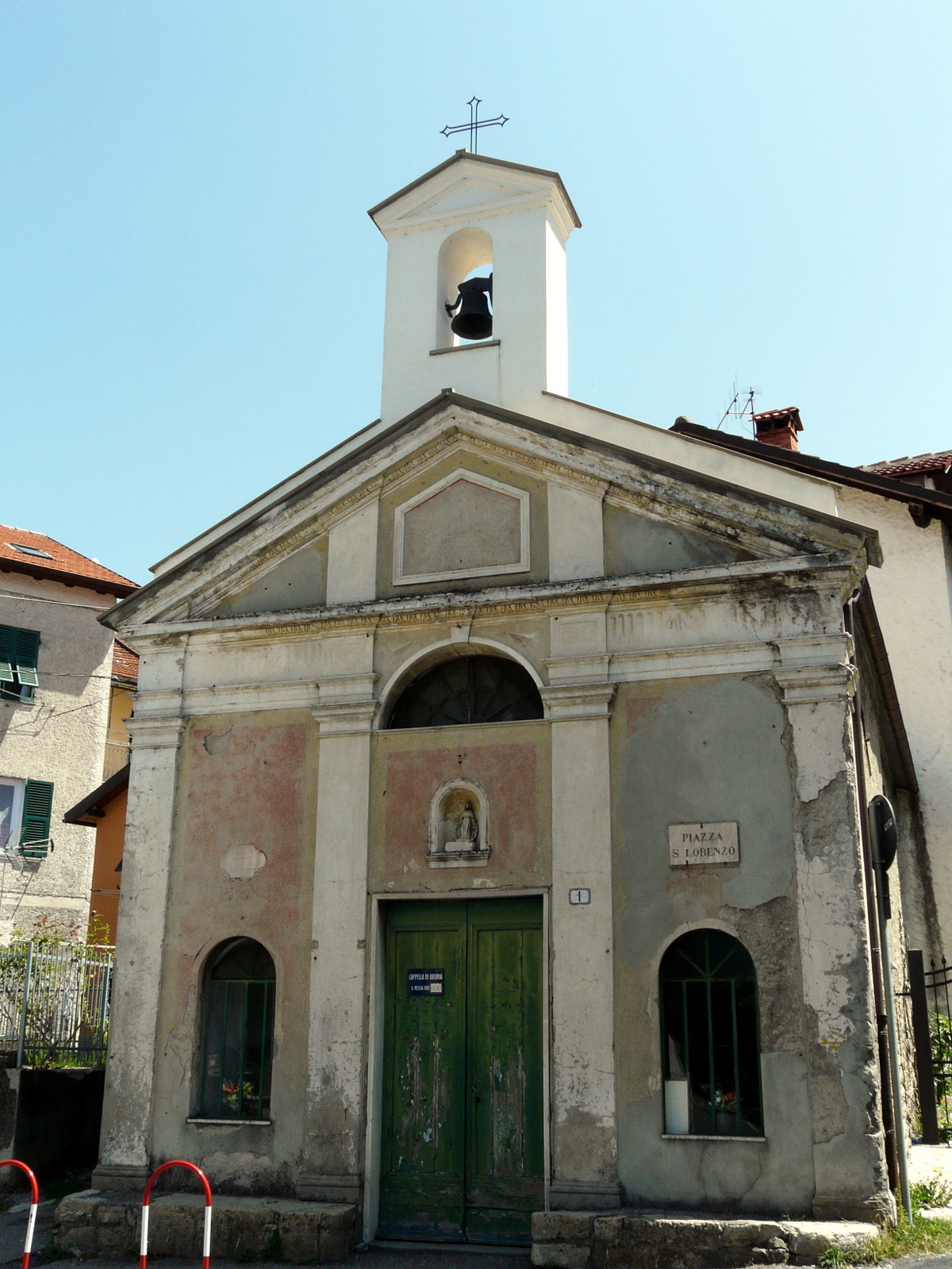 La cappella di San Lorenzo a Bromia, Montoggio, Liguria, Italia